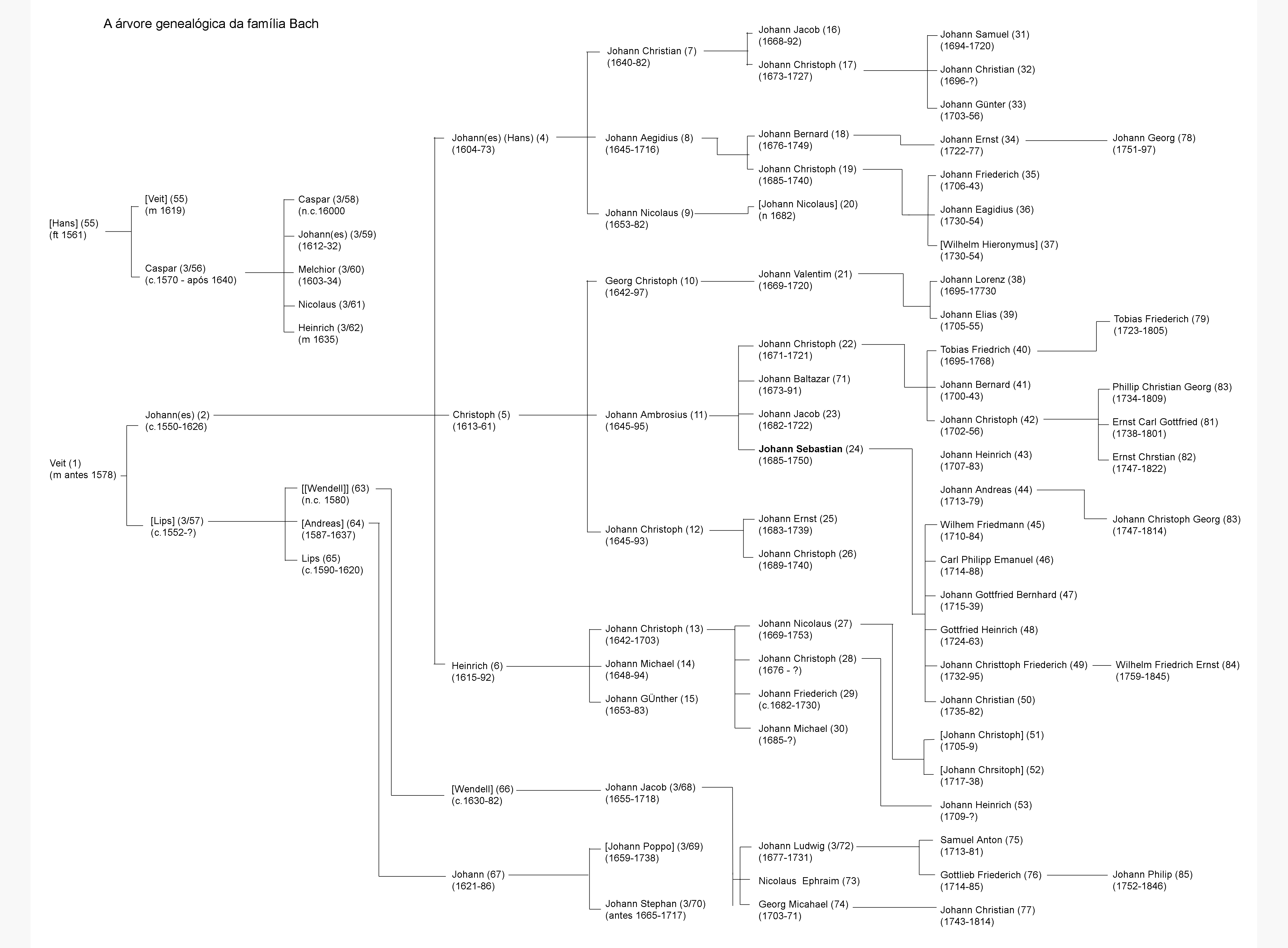 genealogia da familia Bach, a partir do Diconário grove de música